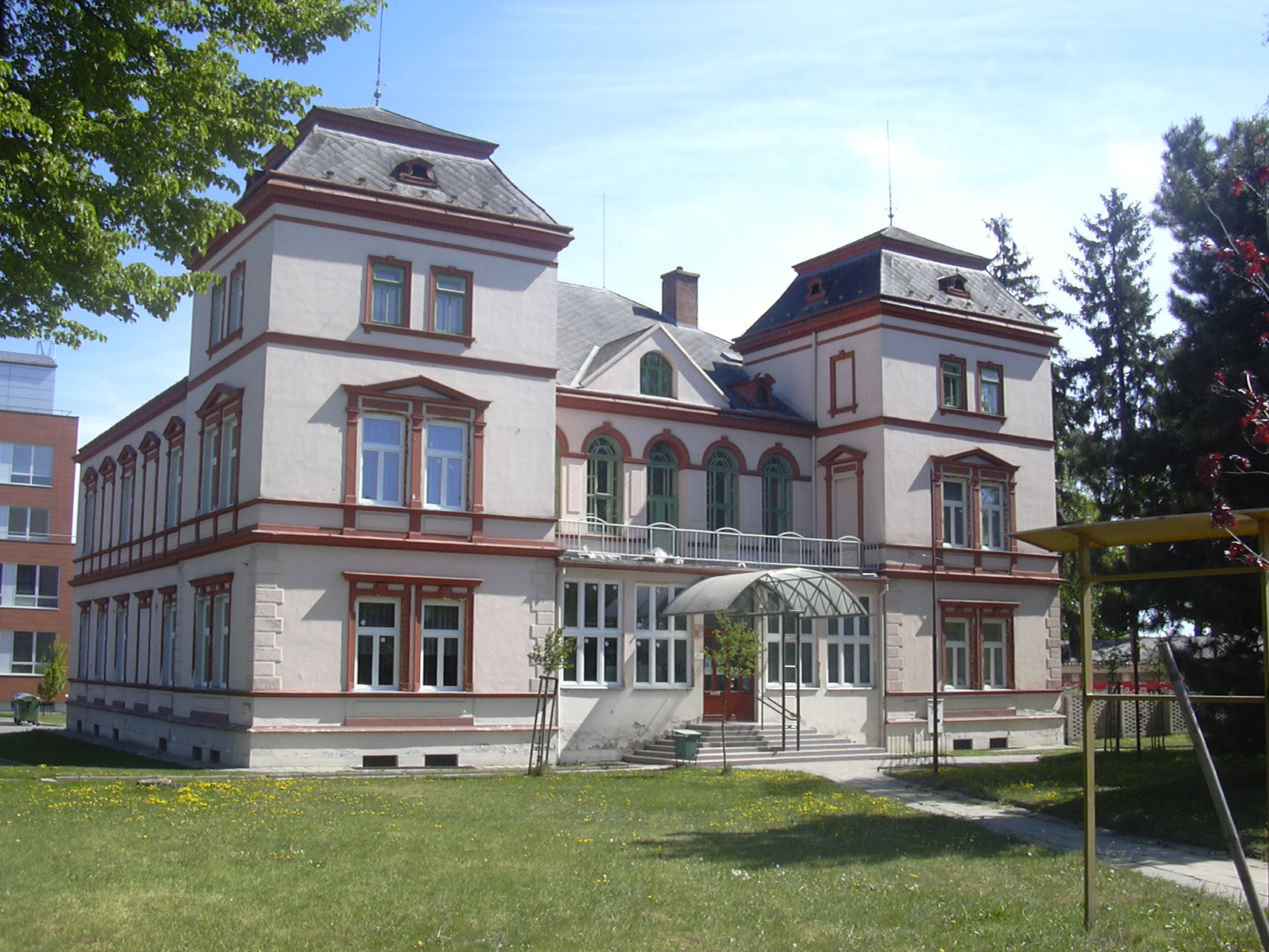 Dům dětí a mládeže (Vyškov- czech republic)